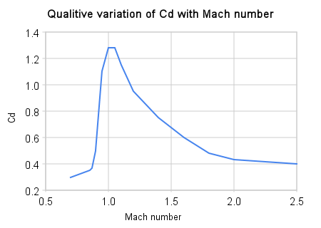 Qualitive variation of Cd factor with Mach number for aerospace vehicles